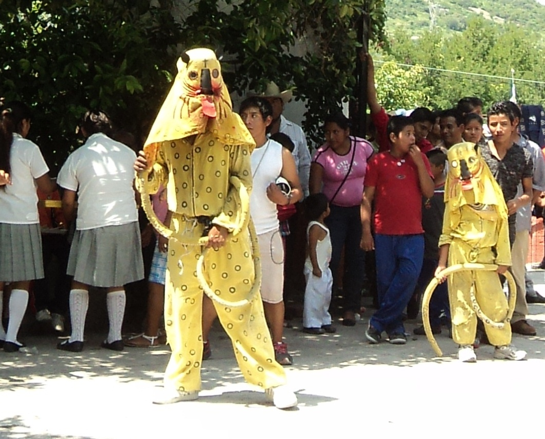 danza del tecuan de alpuyeca